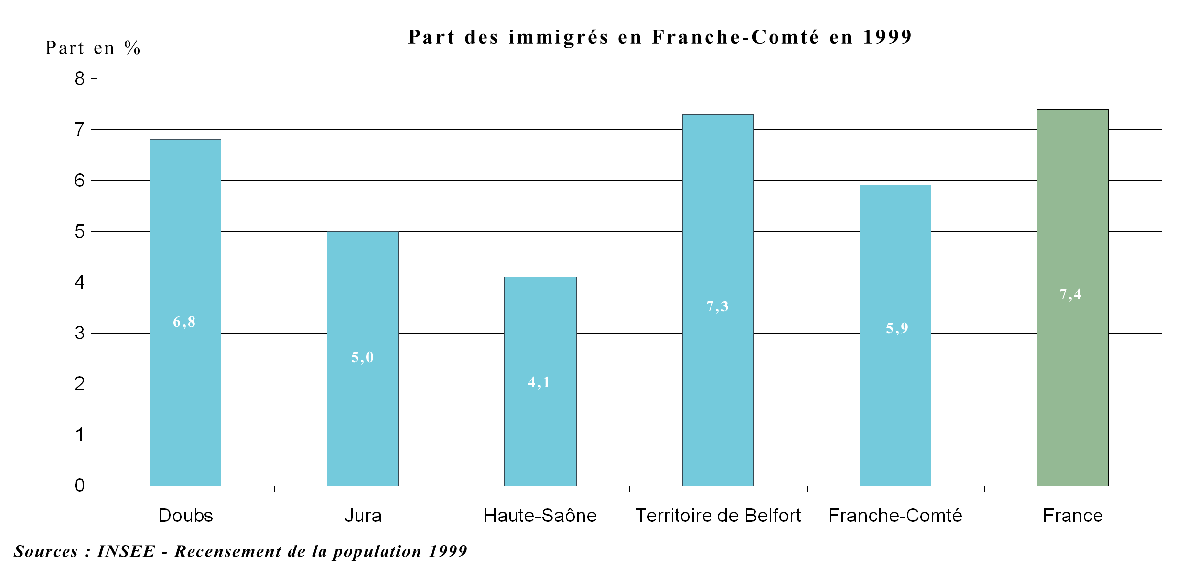 Parts des immigrés en franche-comté en 1999